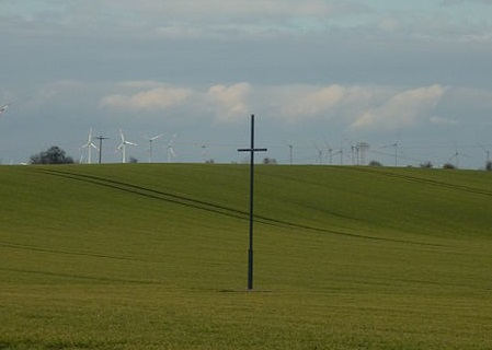 Stahlkreuz Löderburg